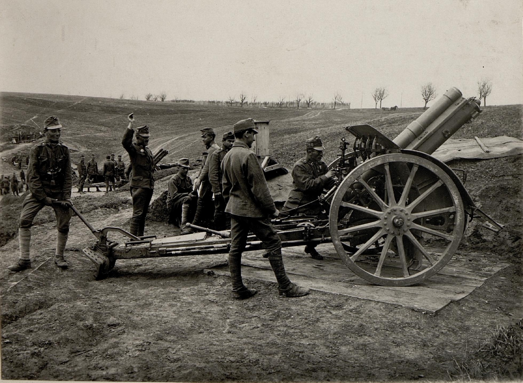 Geschütz in Feuerstellung